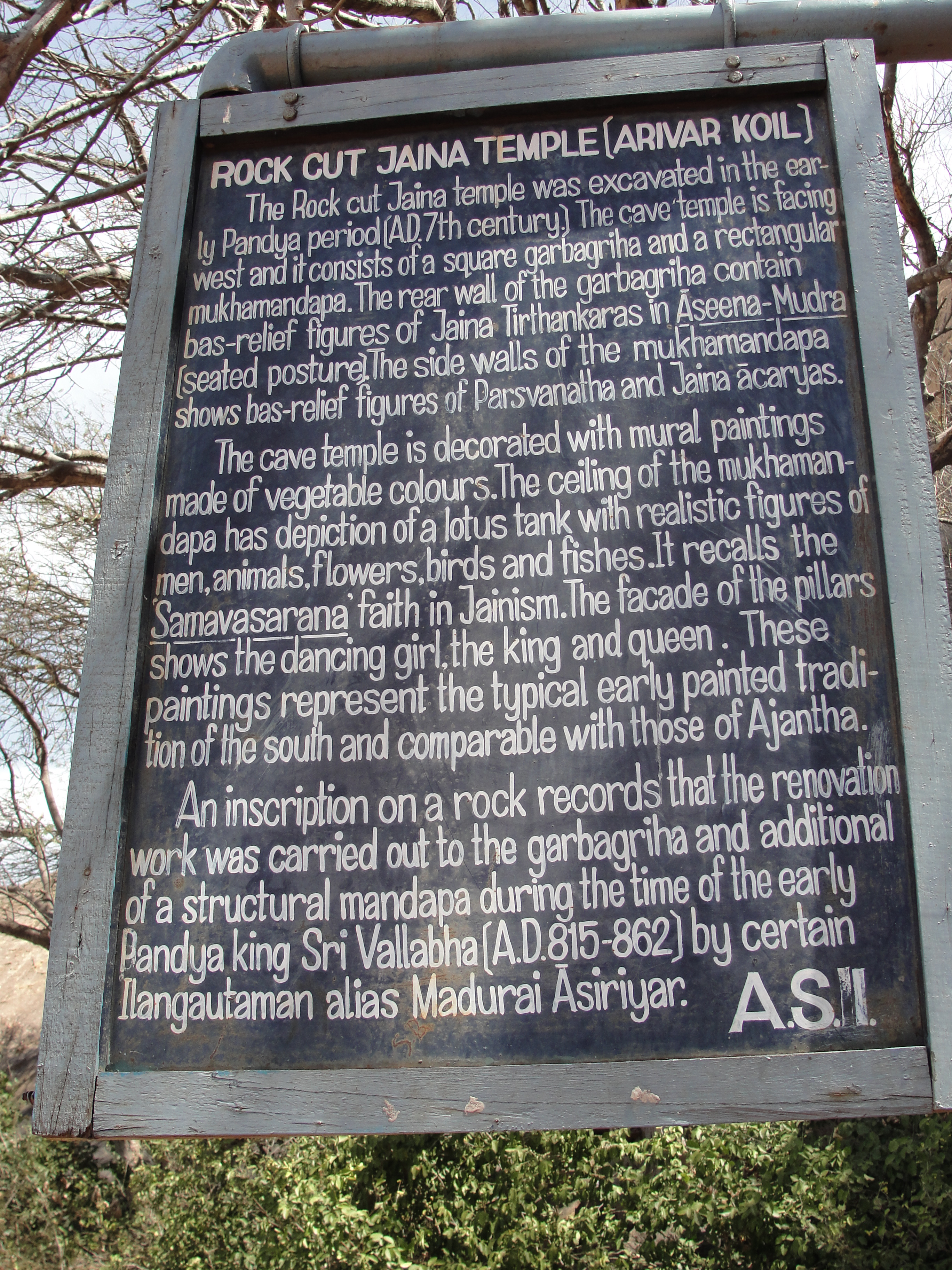 சித்தன்னவாசலில் இந்திய தொல்லியல் கழக அறிவிப்புUnknown a asi sign board on sittanavasal in english